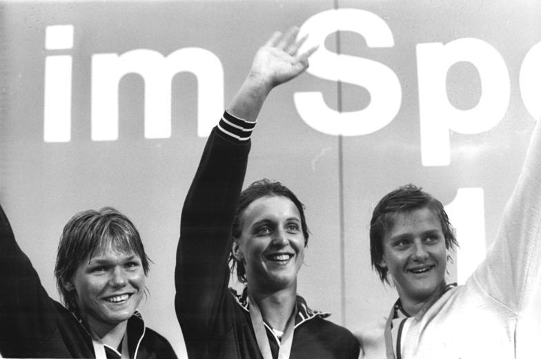 Barbara Krause, Heike Witt, Caren Metschuck ADN-ZB Link 5.7.78-str-Berlin: DDR-Meisterschaften im Sportschwimmen- Ihren zweiten und damit den vierten Weltrekord insgesamt dieser Titelkämpfe holte sich am 5.7. Barbara Krause (M.) über 100 m Freistil in 55,41 s. Ihre Klubkameradin vom SC Dynamo Berlin Heike Witt (l.) wurde Zweite vor Caren Metschuck (SC Empor Rostock). Caren Metschuck Barbara Krause (Schwimmerin)